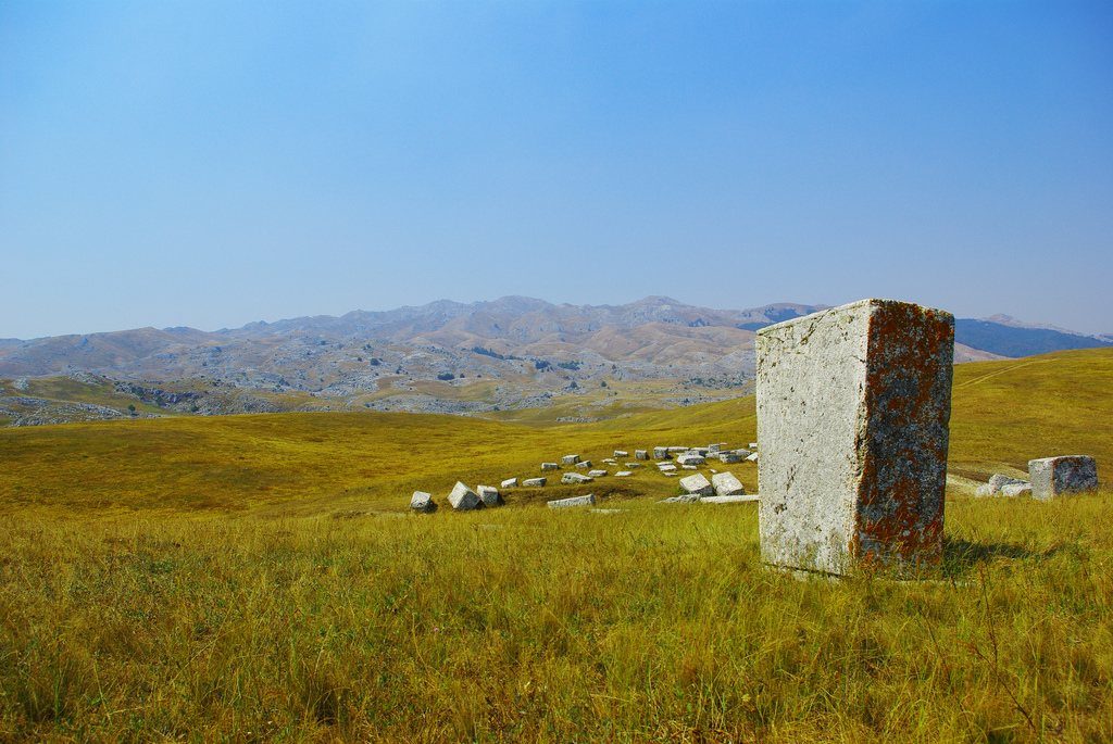 BiH 2012 - Nécropole Morine